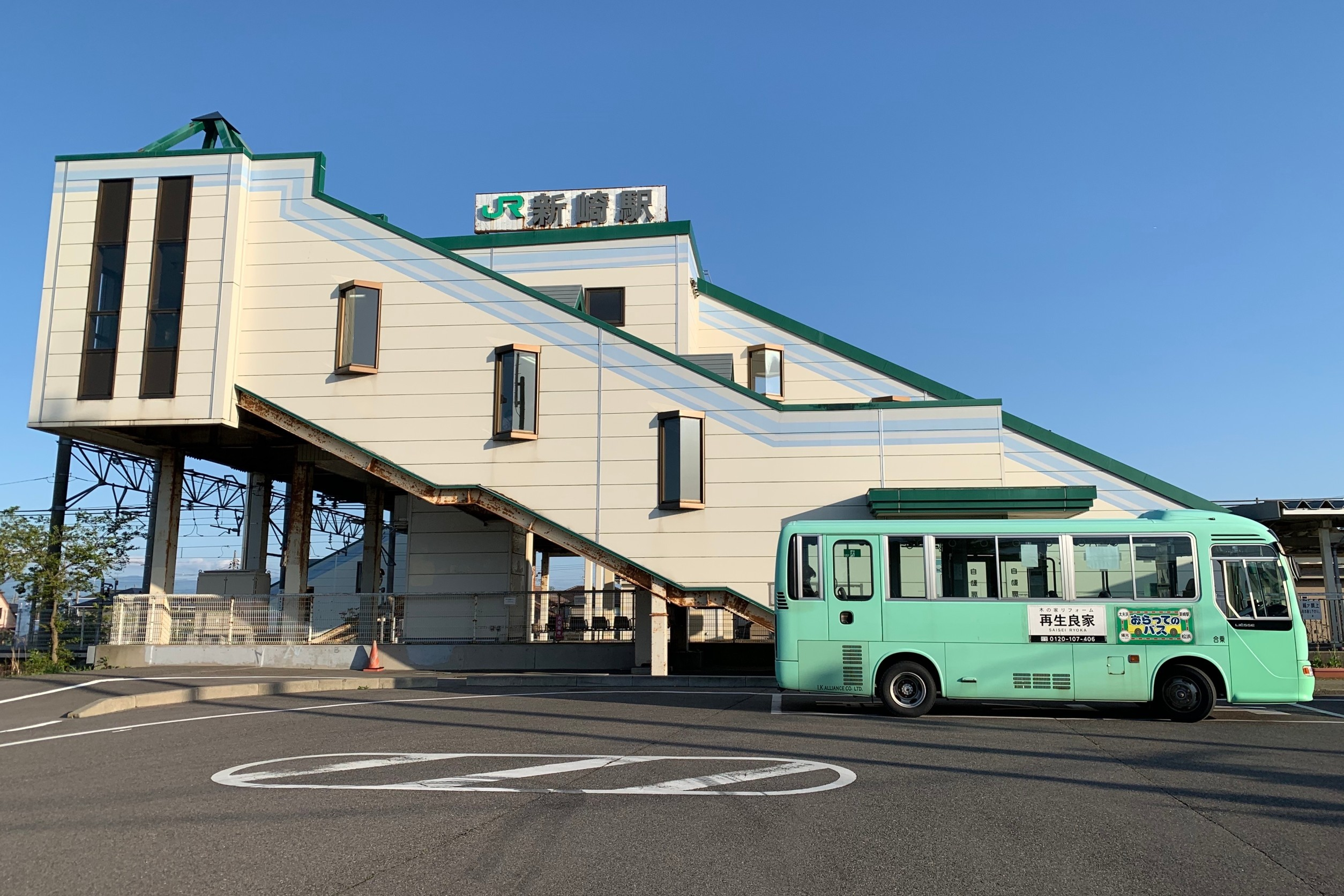 JR白新線新崎駅北口（2020年5月）停車中のバスはおらってのバス